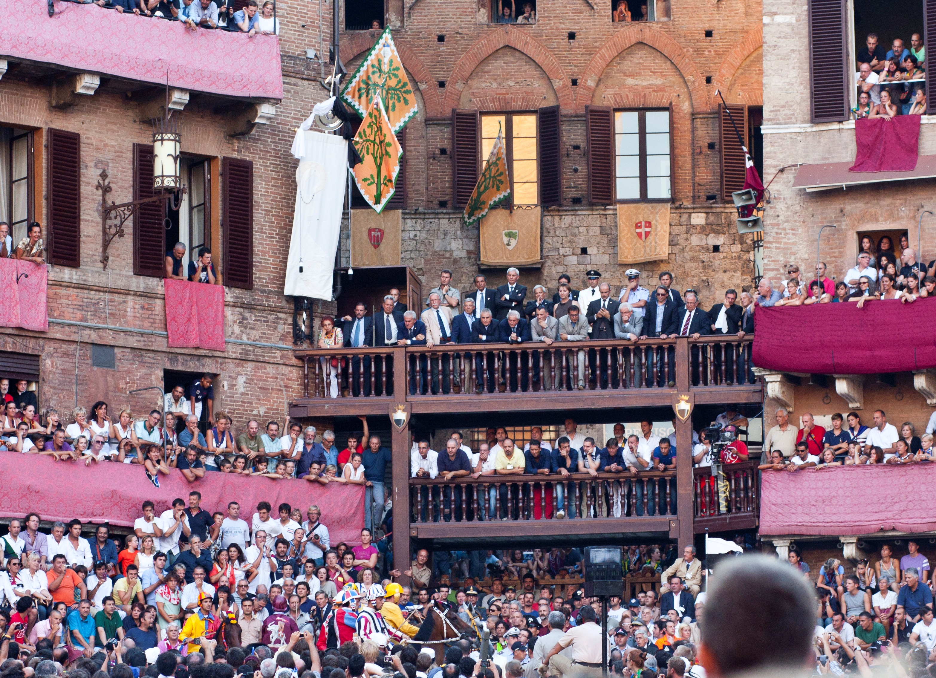 Palio di Siena agosto 2011 - Palco dei Giudici